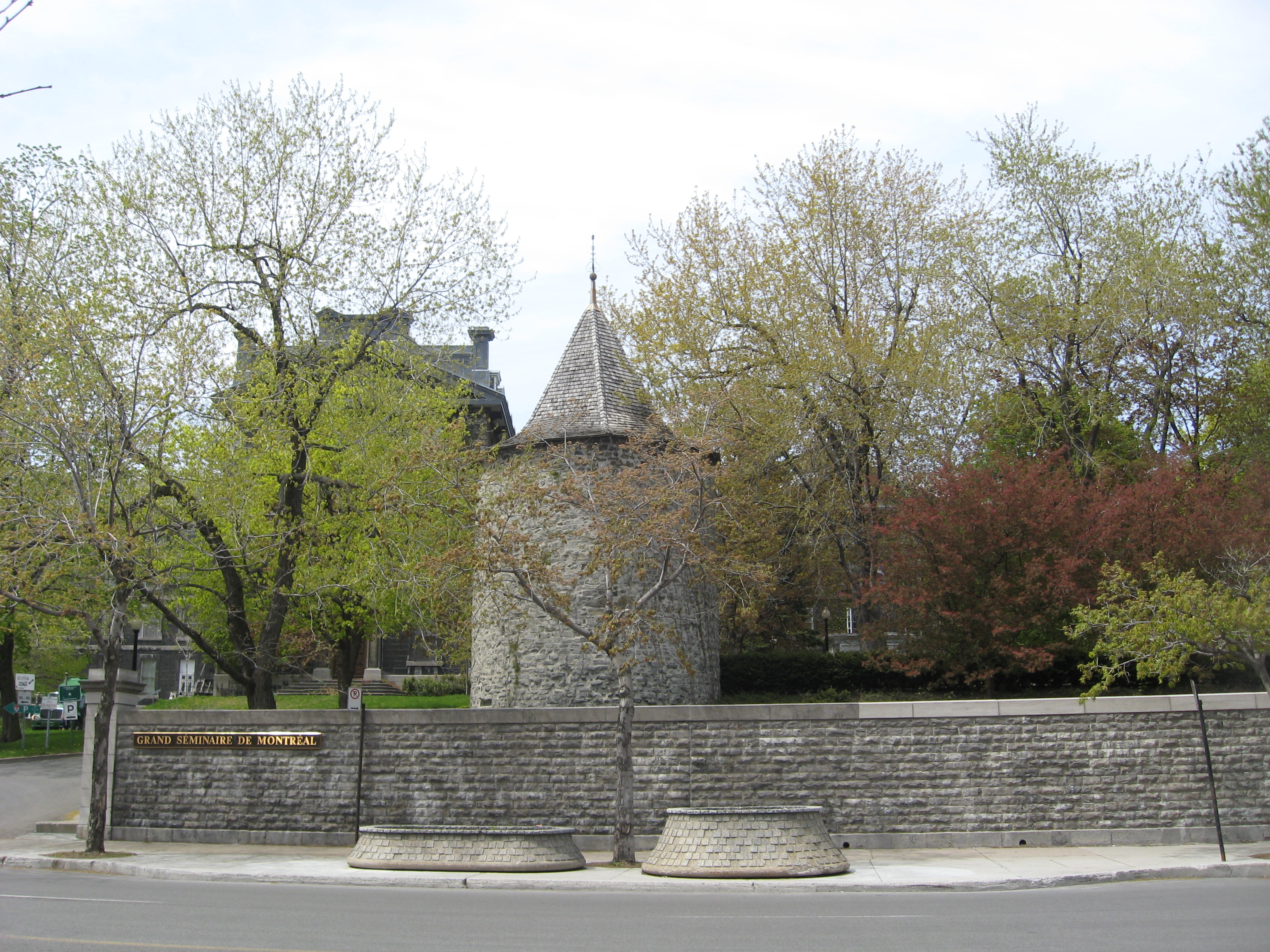 Vestiges du Fort de la Montagne sur la propriété du Grand Séminaire de Montréal, rue Sherbrooke, Montréal, Québec (ca 1685)